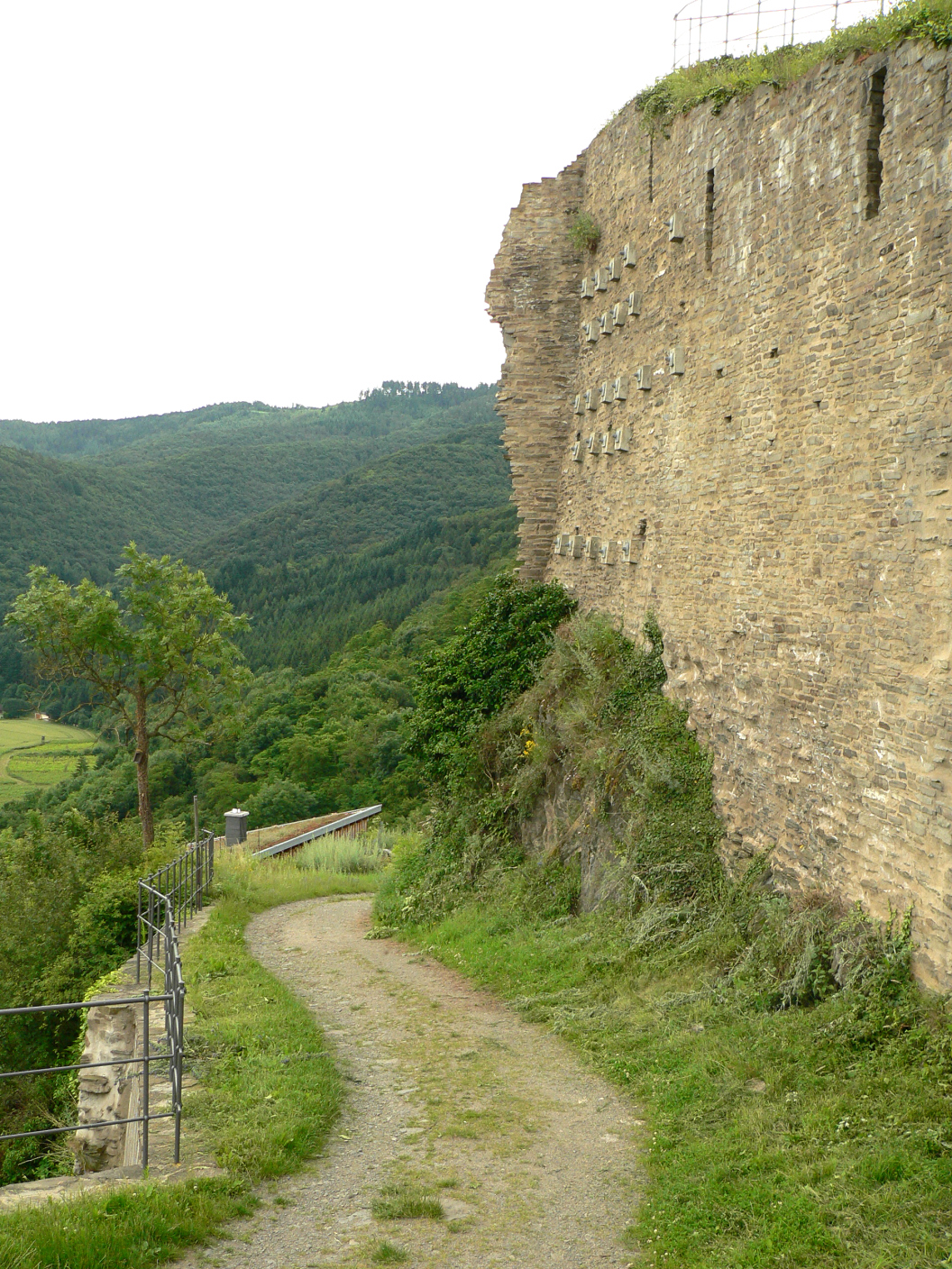 Saffenburg